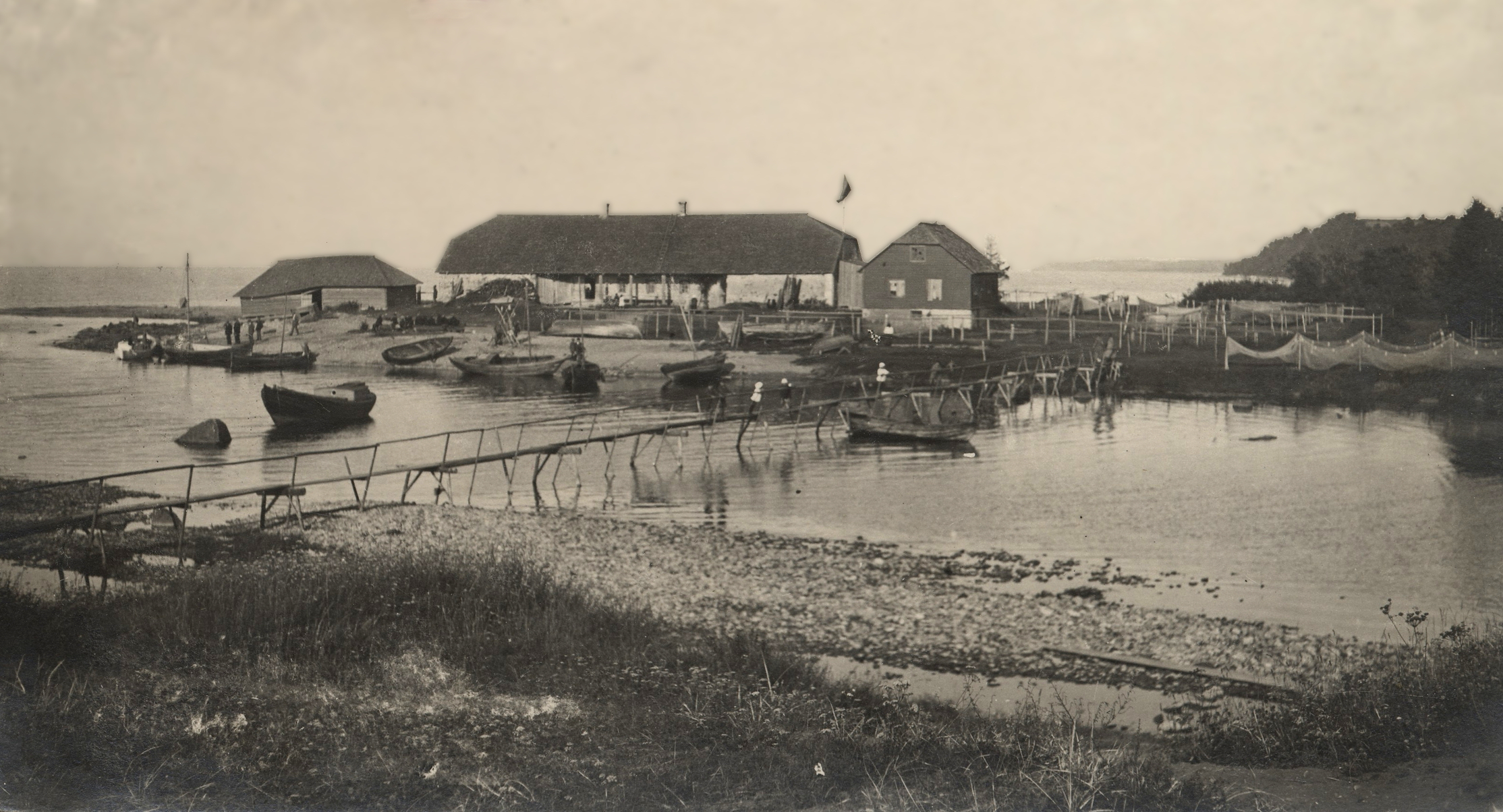 Purtse rand 1920. aastatel